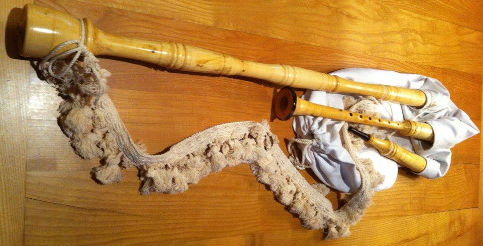 Gait Mirandesa réplica da de Tiu Pepe